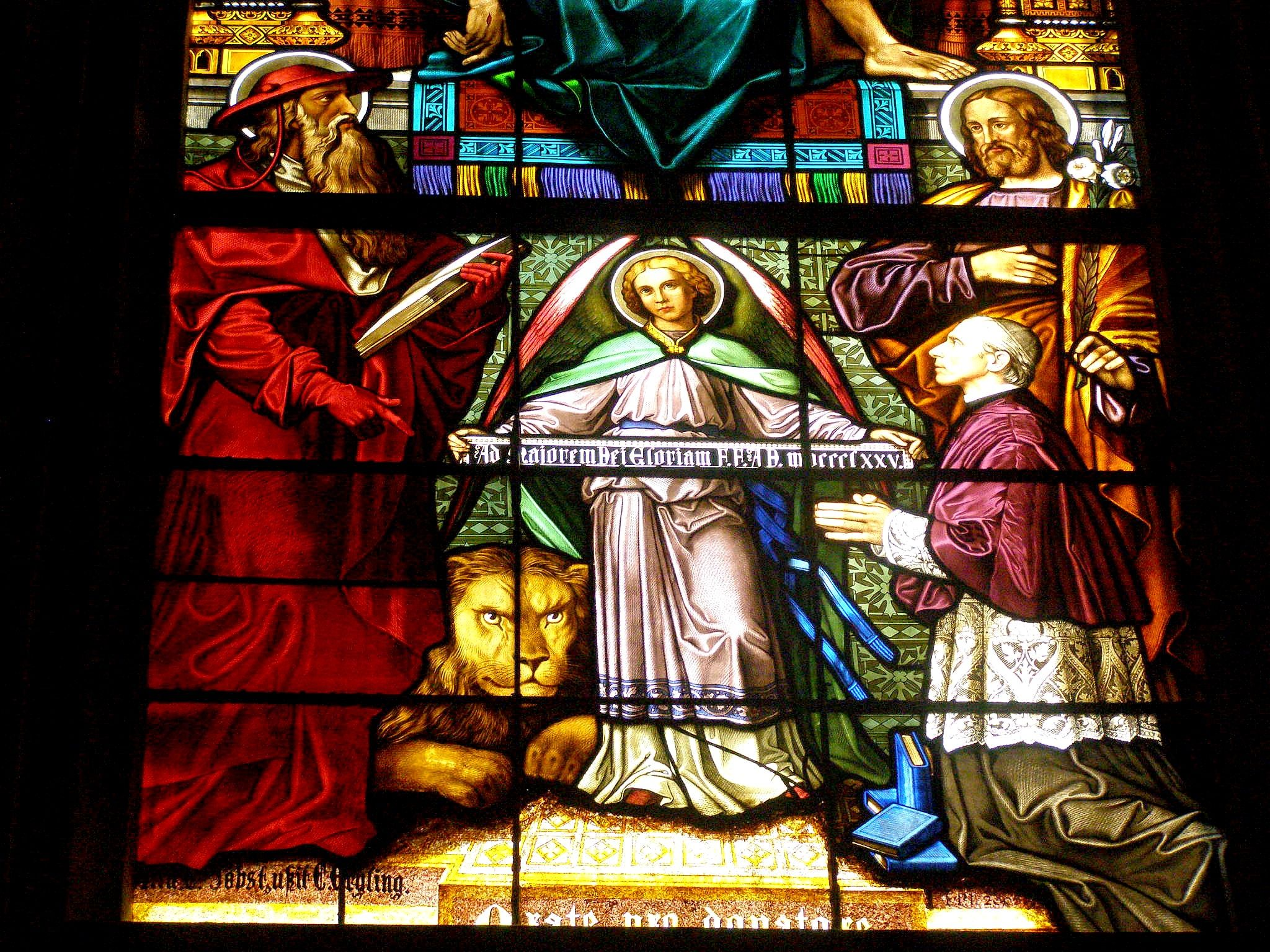 Detail okna Jozefa Danka. Donátor sa nechal na vitráži zobraziť kľačiac po ľavej ruke anjela držiaceho stuhu s vročením 1875. Za Dankom stojí jeho osobný patrón sv. Jozef, oproti stojí sv. Hieroným so svojím atribútom - levom